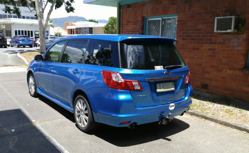 スバル・エクシーガ